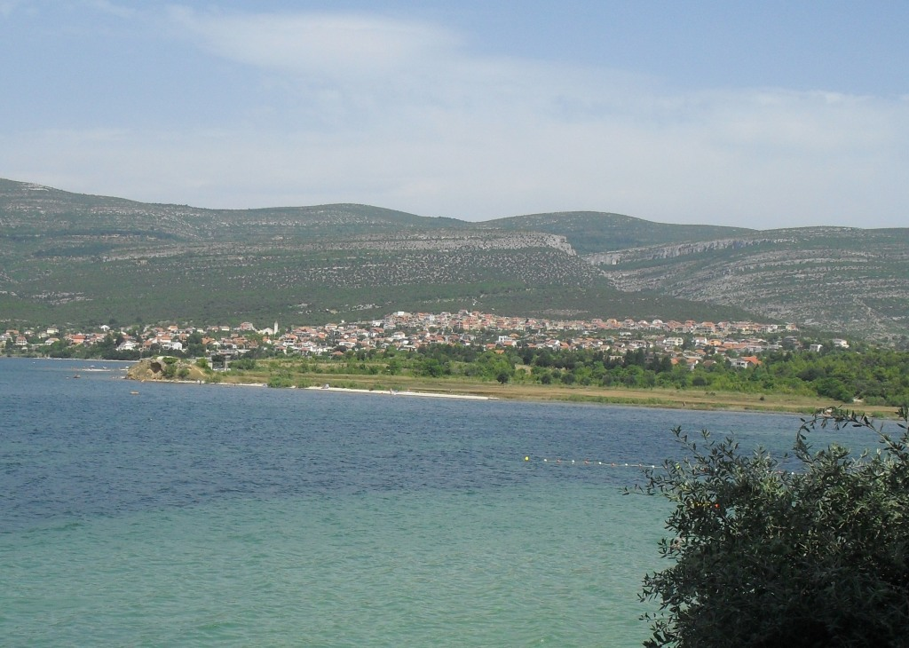 Поглед на Горњи Карин, Далмација